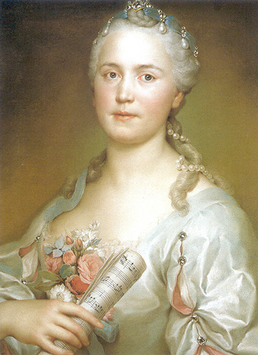 Die Sängerin Regina Mingotti